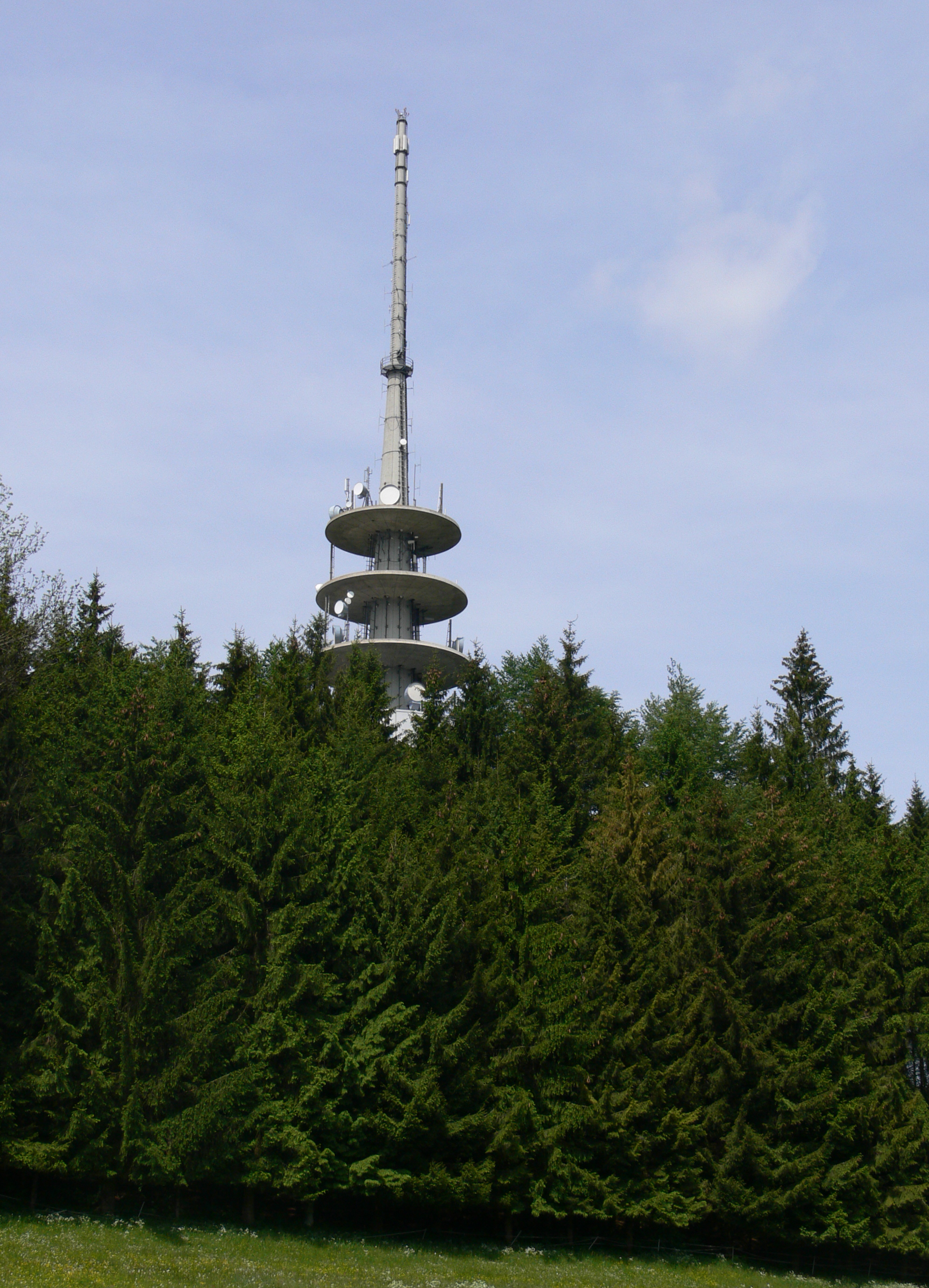 Fernmeldeturm (siehe Typenturm), Waldburg, Kreis Ravensburg